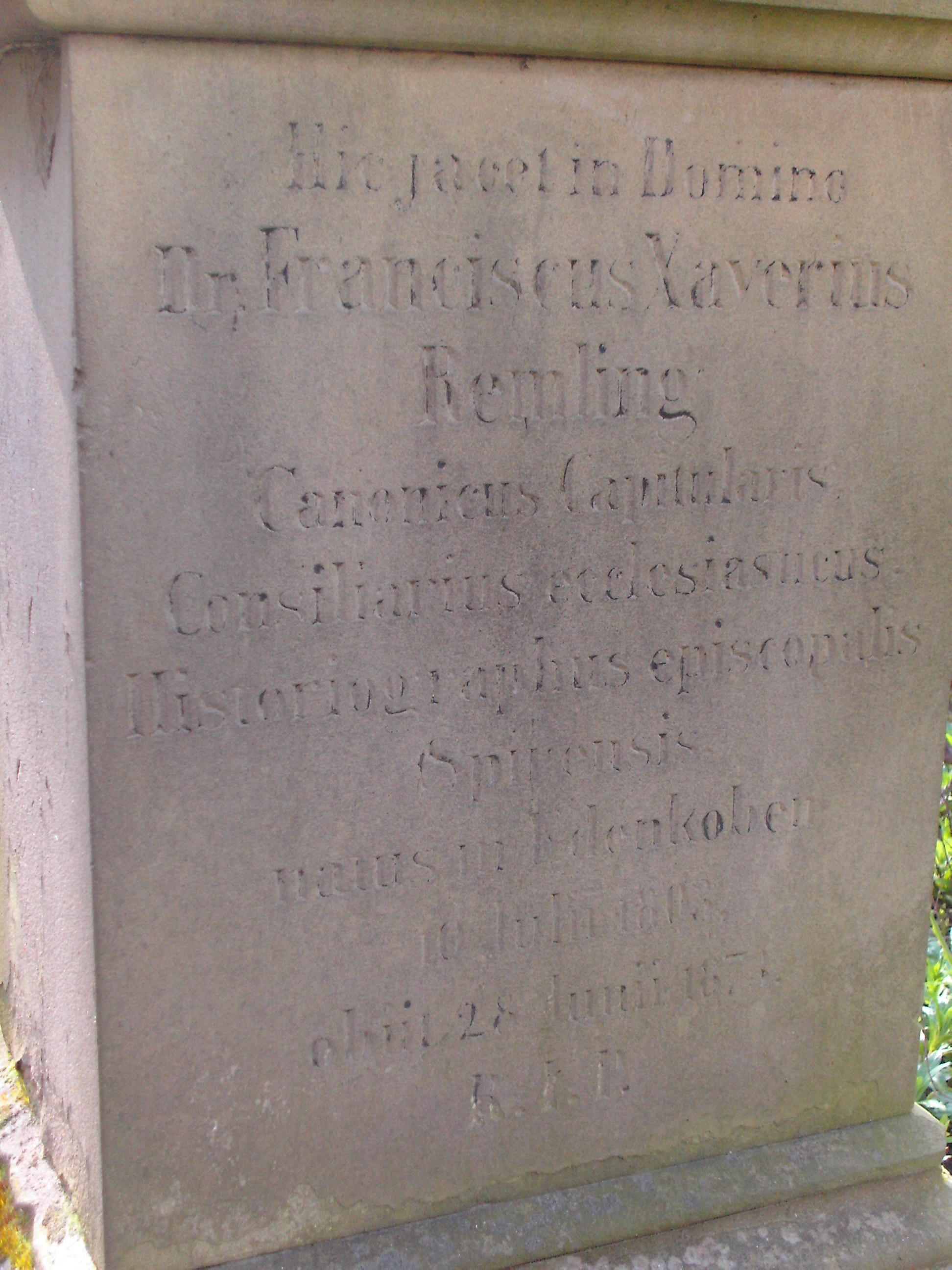 Franz Xaver Remling Domkapitular Speyer, Grab